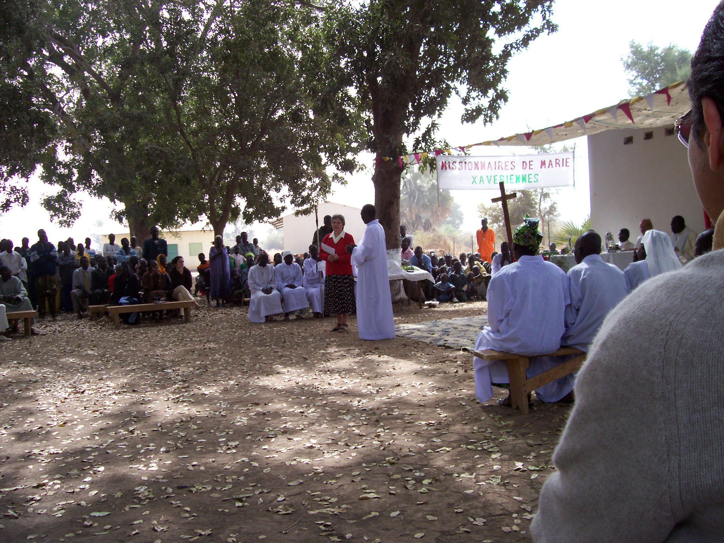 Foto personale 2007